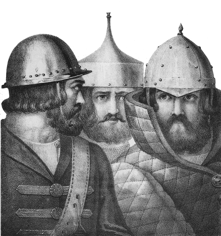 Русское вооружение с XIV до второй половины XVII столетия. Шапки железные.